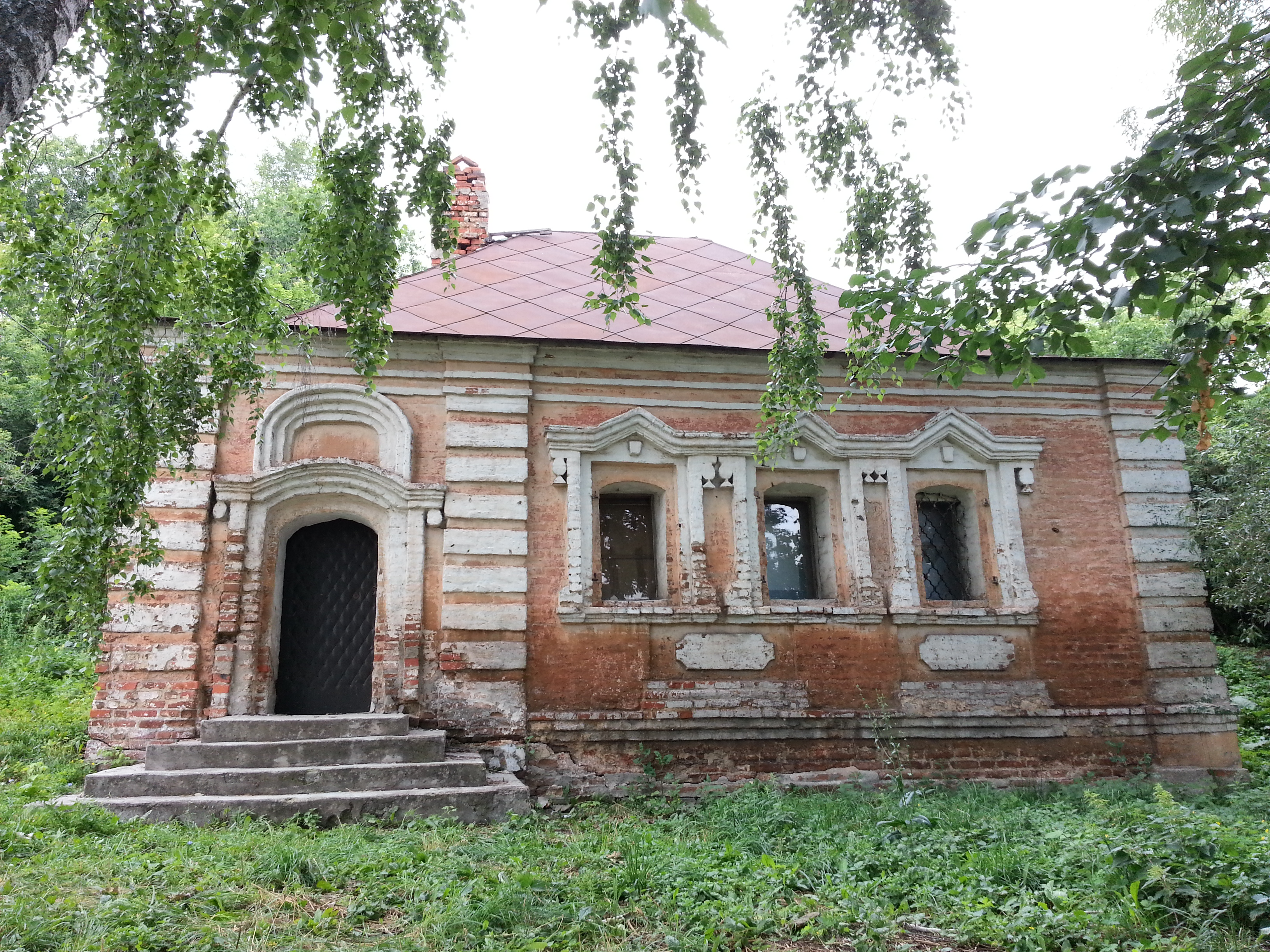 Податная изба (старое казначейство) (Рязанская область, Михайлов, Красная площадь)